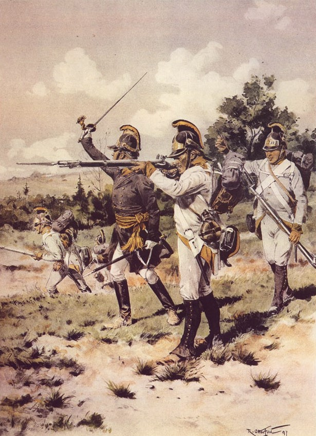 Armée autrichienne : infanterie allemande, 1798-1805.